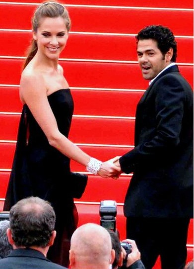 Melissa Theuriau et Jamel Debbouze au festival de Cannes